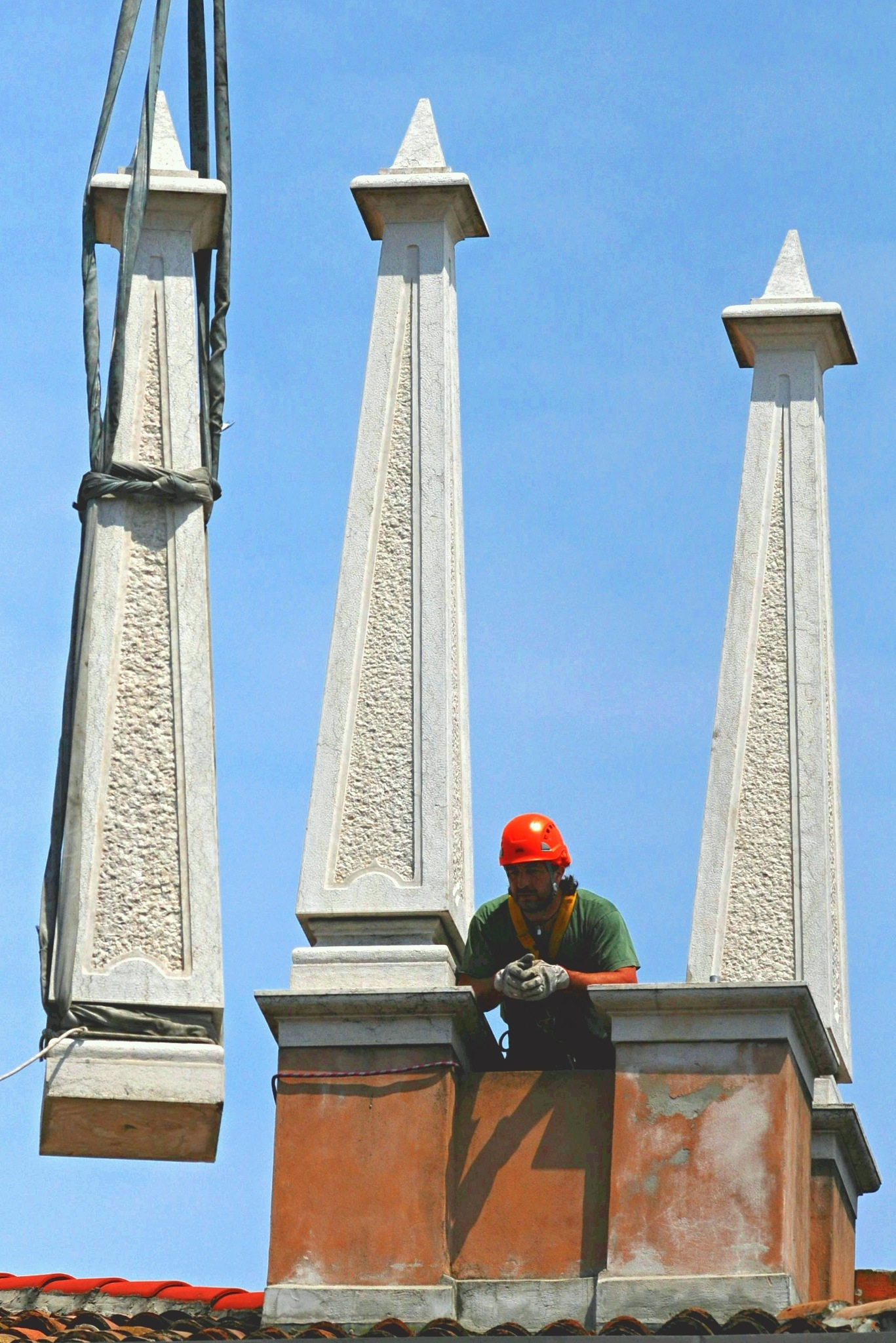 Terremoto 2012, palazzo della Borsa: il peso e' di circa 12 quintali